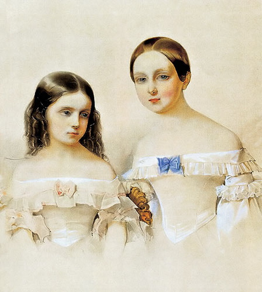 Портрет великих княжон Екатерины Михайловны и Марии Михайловны.